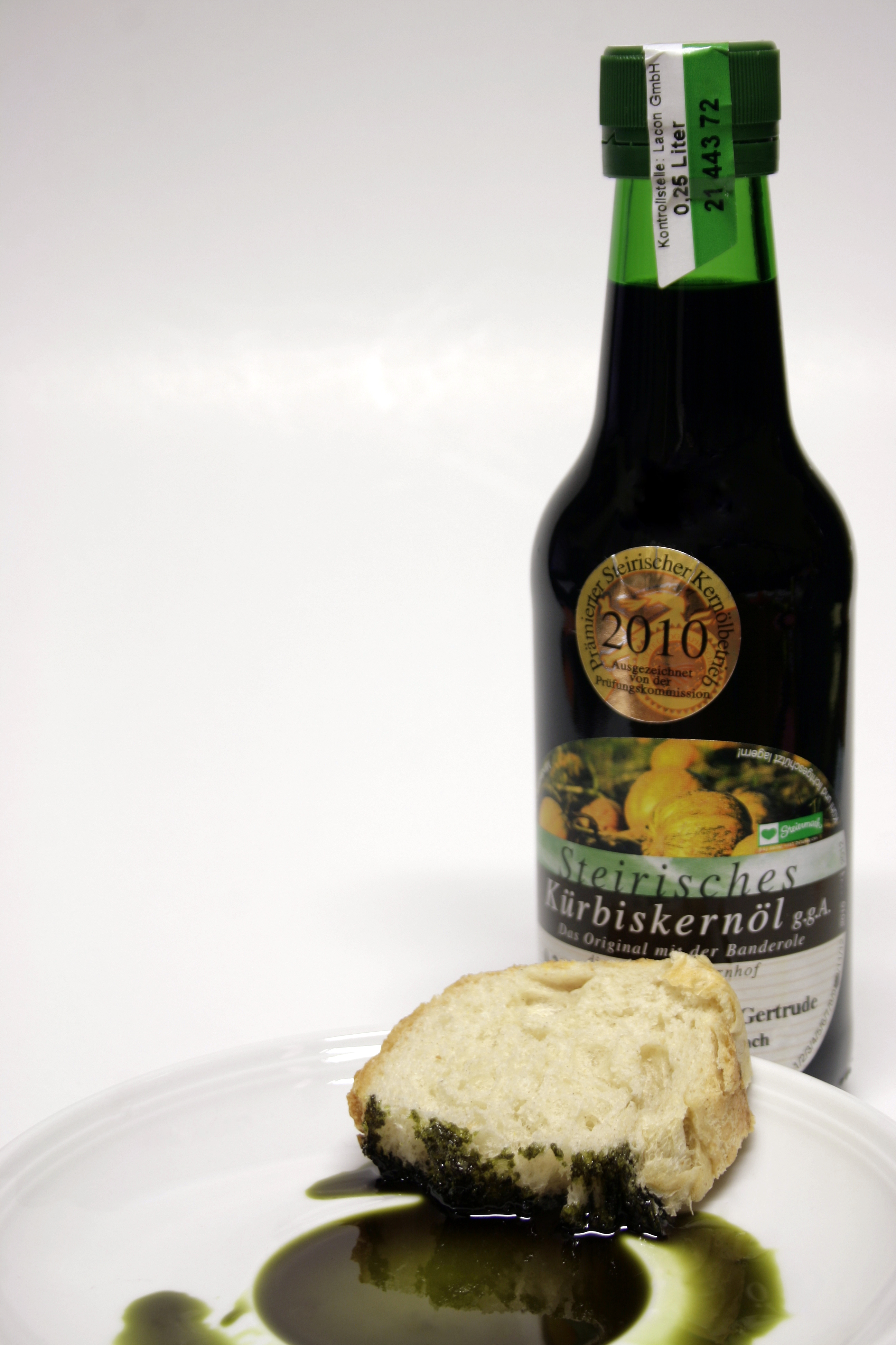 Kürbiskernöl mit Flasche